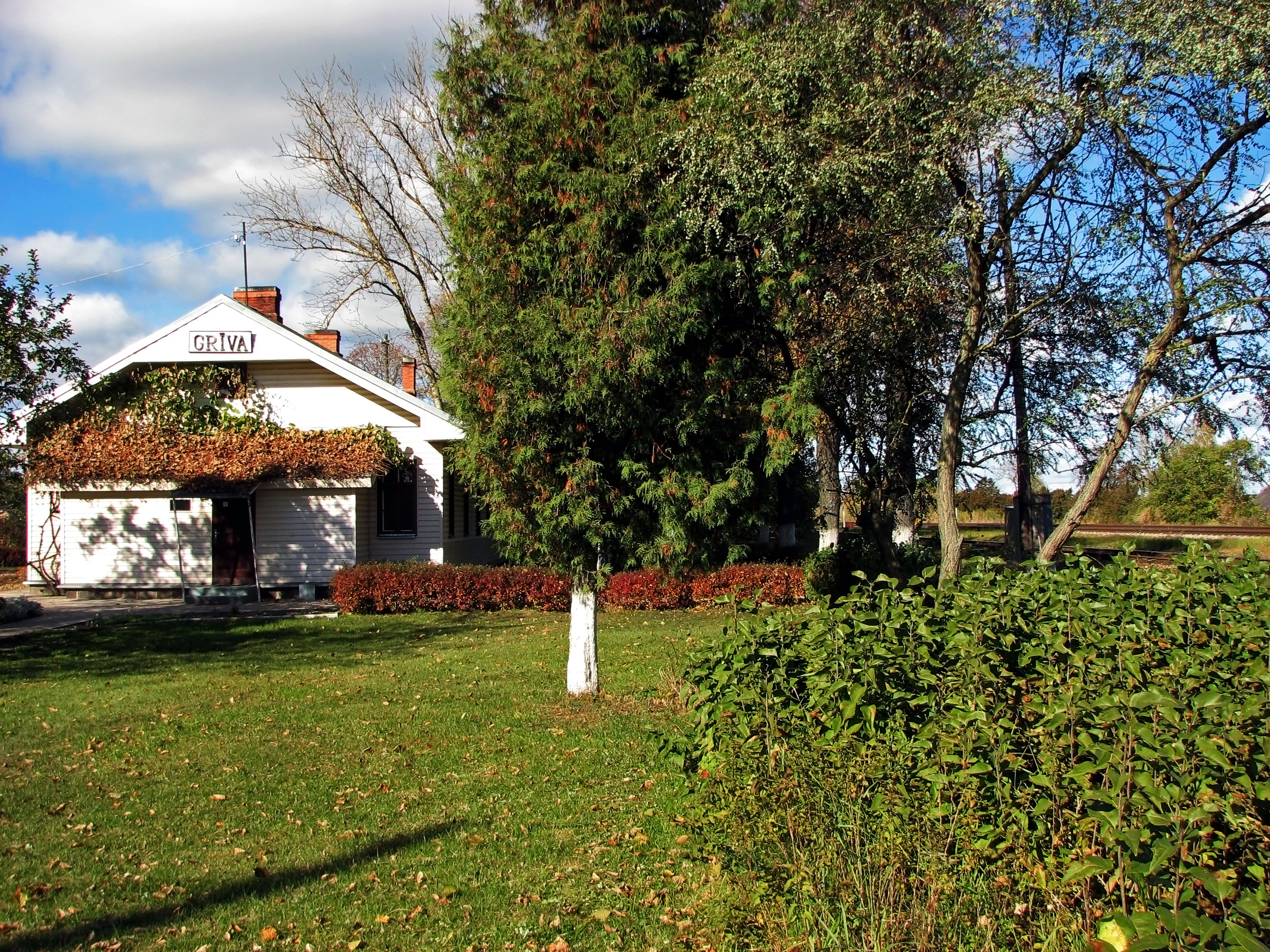 станция Грива